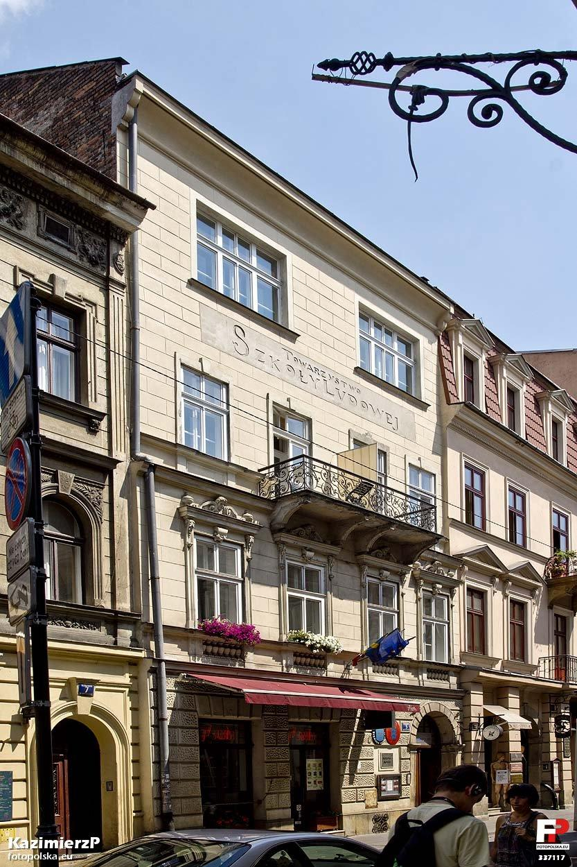 Jak widać tu mieściło się Towarzystwo Szkoły Ludowej.